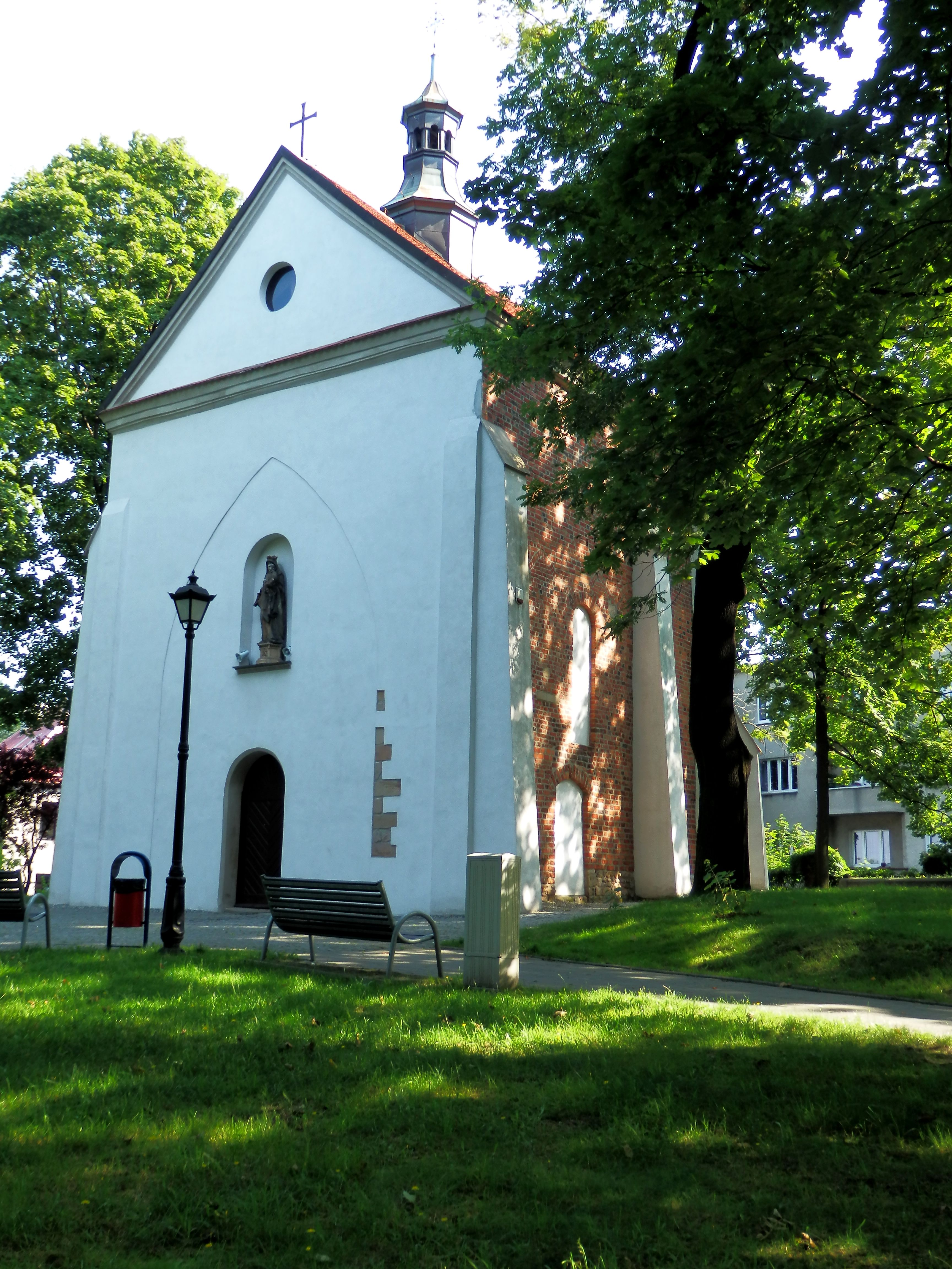 Rybnik, kościół akademicki pw. Wniebowzięcia NMP, poł. XV w., 1797 r.